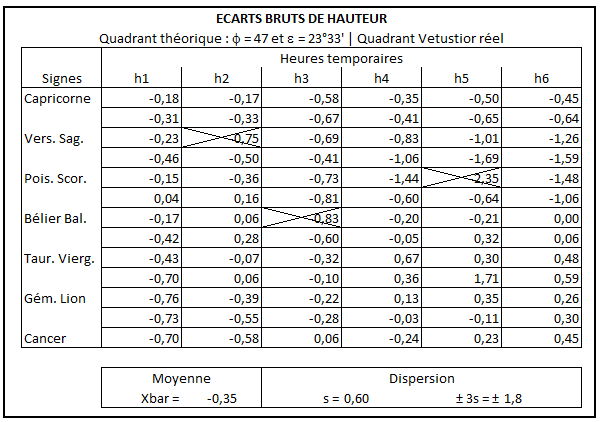 Table des écarts bruts de hauteur entre quadrant réel et quadrant théorique.